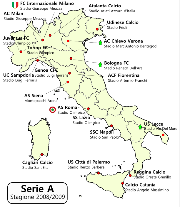 Distribuzione geografica squadre Serie A 2008-2009